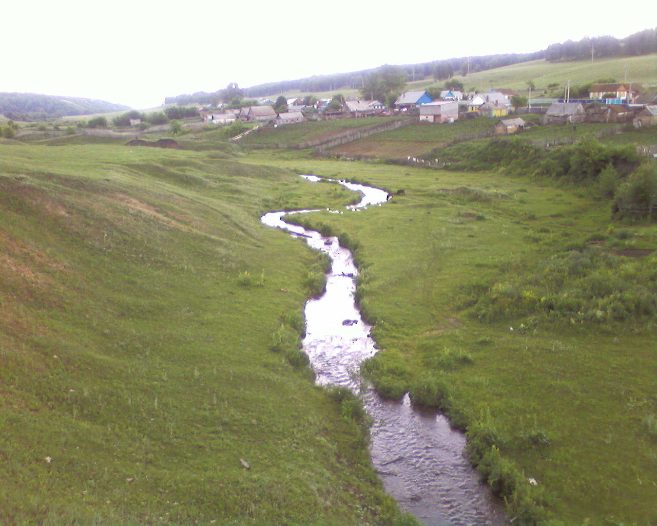 река Шарлама в селе Ермекеево Ермекеевского района, Башкортостан